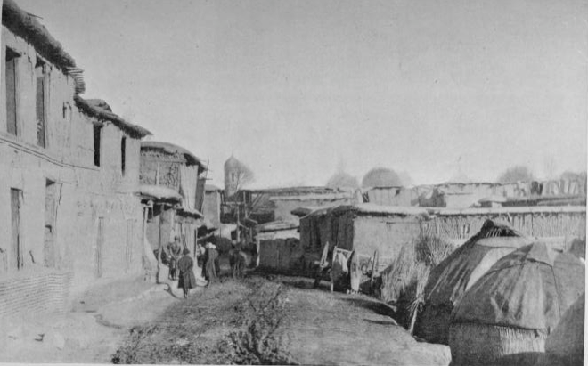 Tashkent